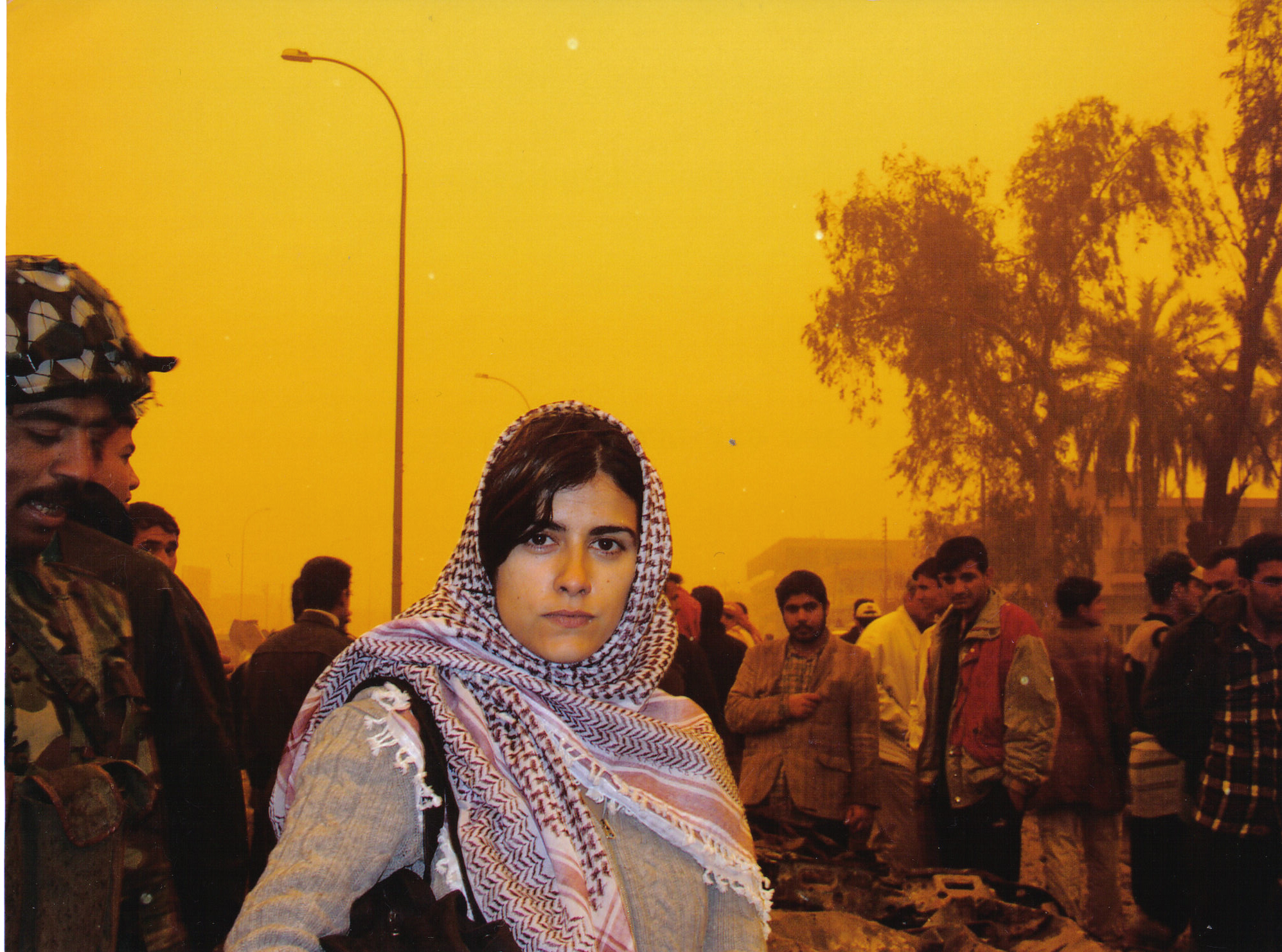 La periodista Olga Rodriguez en Bagdad, tras un bombardeo estadounidense, marzo 2003